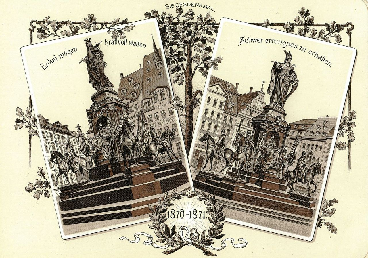 Quelle: Leporello-Album um mit verschiedenen Ansichten, erschienen bei Bruno & Ottilie Bürger, Leipzig um 1896